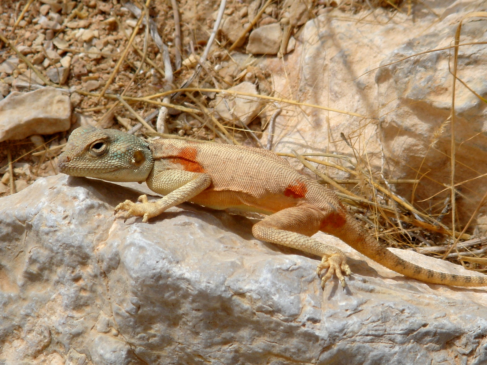 Pseudotrapelus sinaitus at Peres river (נחל פרס), Israel חרדון סיני בערוץ נחל פרס